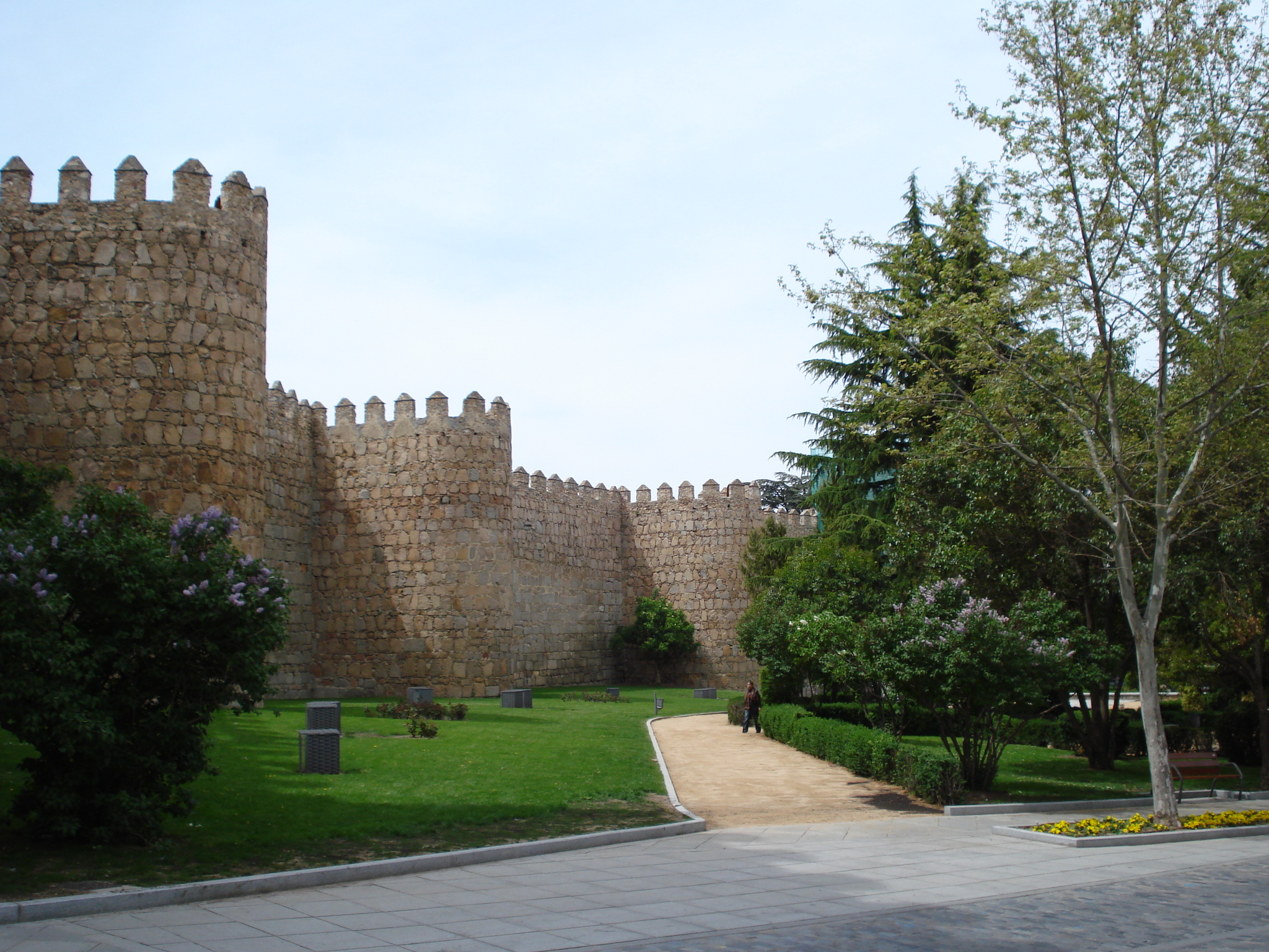 Murallas de Ávila (España) junto a la puerta de San Vicente